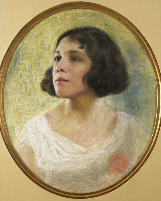 Хильда Глезер (1893—1932) — эстонская актриса, режиссёр, театральный педагог.